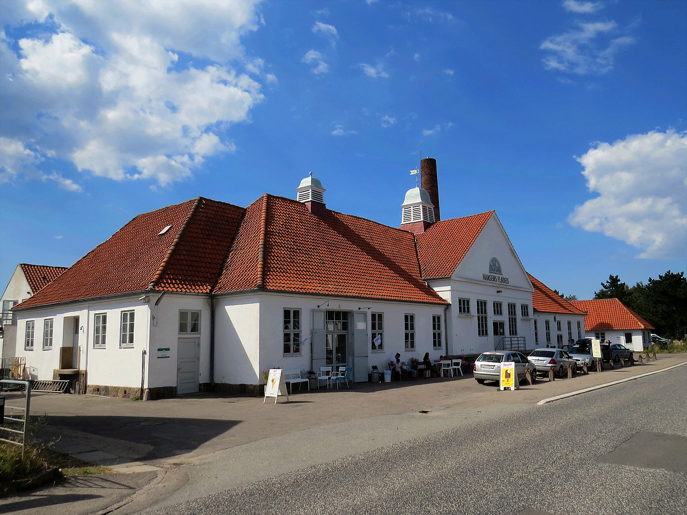 Hansens Flødeis, Landerslev, Jægerspris, Sjælland, Danmark